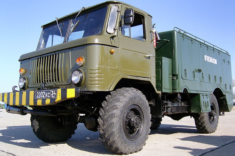 Заправщик специальными жидкостями ЗСЖ-66 на Тамбовском авиашоу.